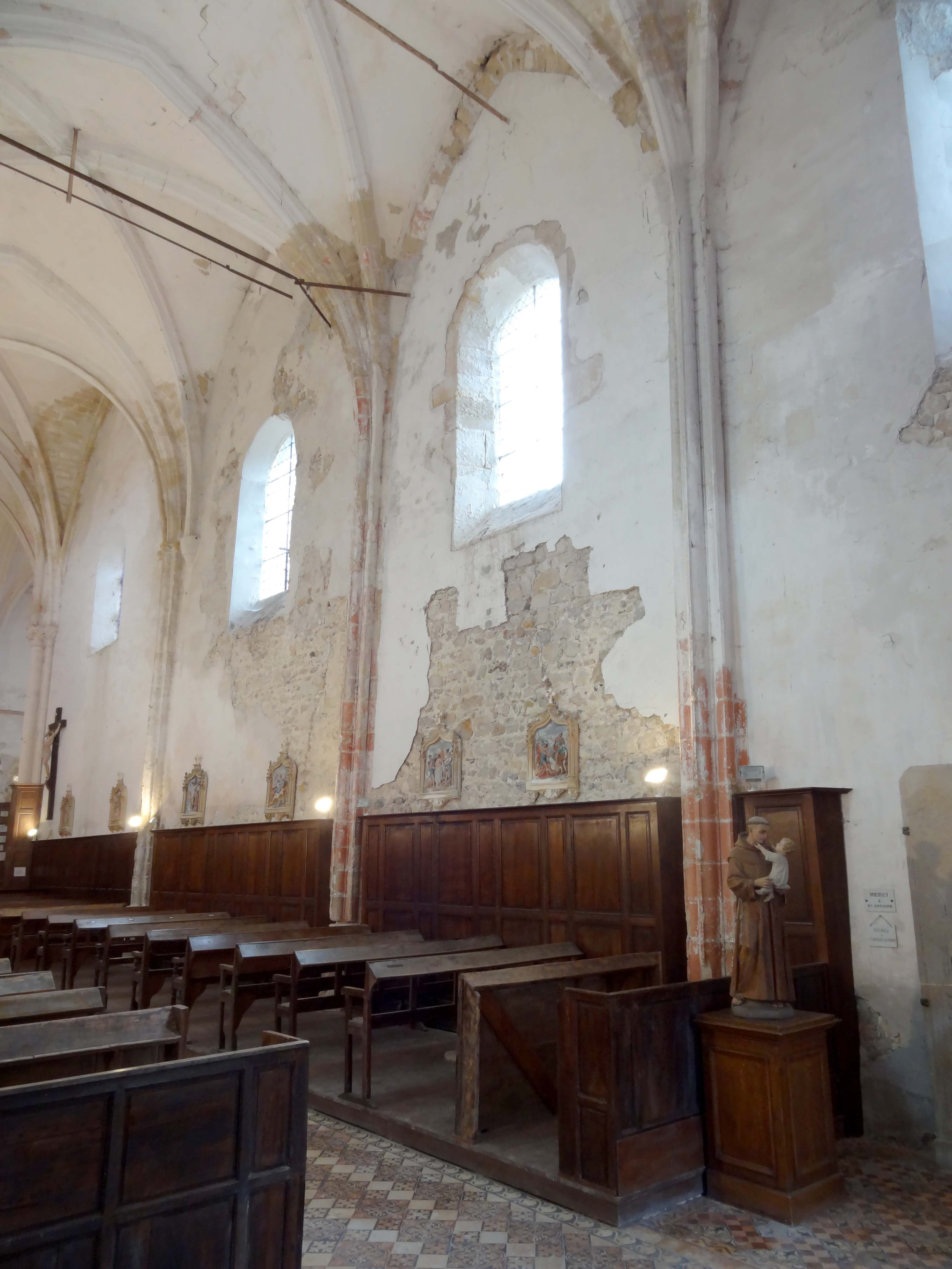 Intérieur de l'église - voir titre.